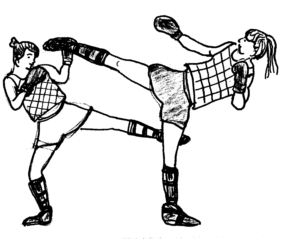 lethwei4.jpg